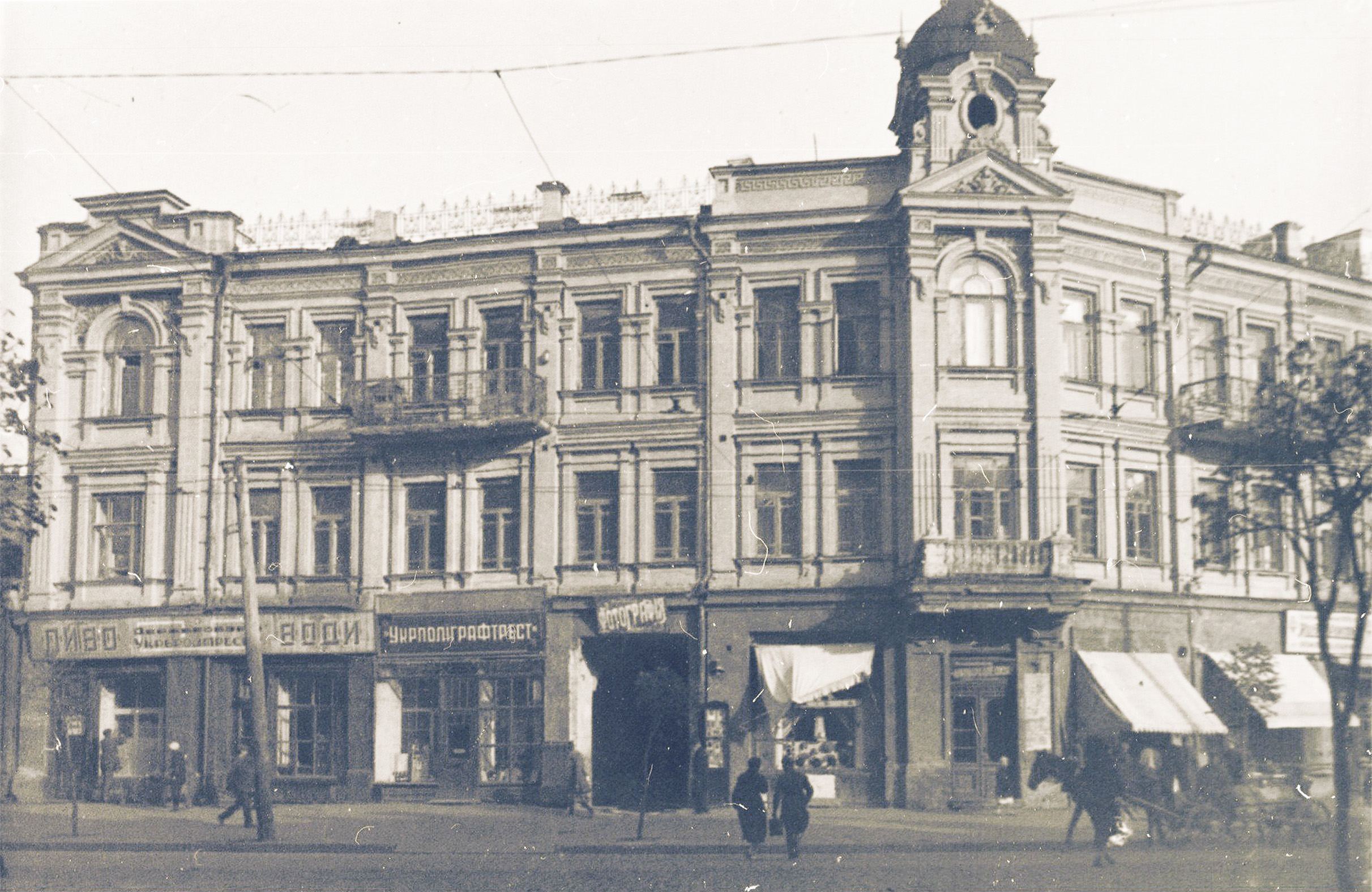 Садиба Пфалера Велика Васильківська вулиця, Київ